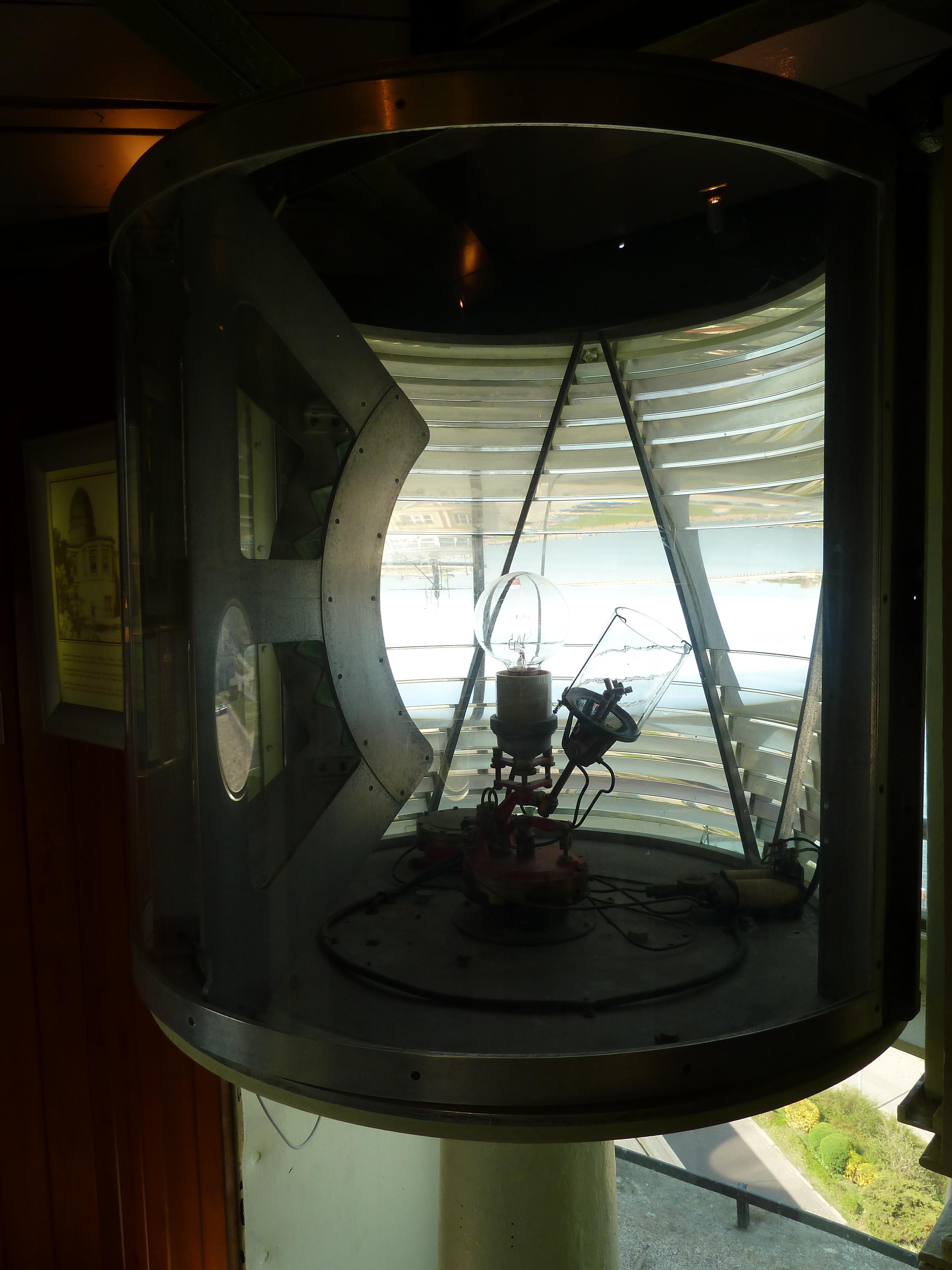 Urządzenie optyczne. Latarnia morska, tzw. "Wieża Pilotów", wraz z otoczeniem zabytku w granicach działki, na której latarnia jest zlokalizowana ul. Przemysłowa 6a, Gdańsk.